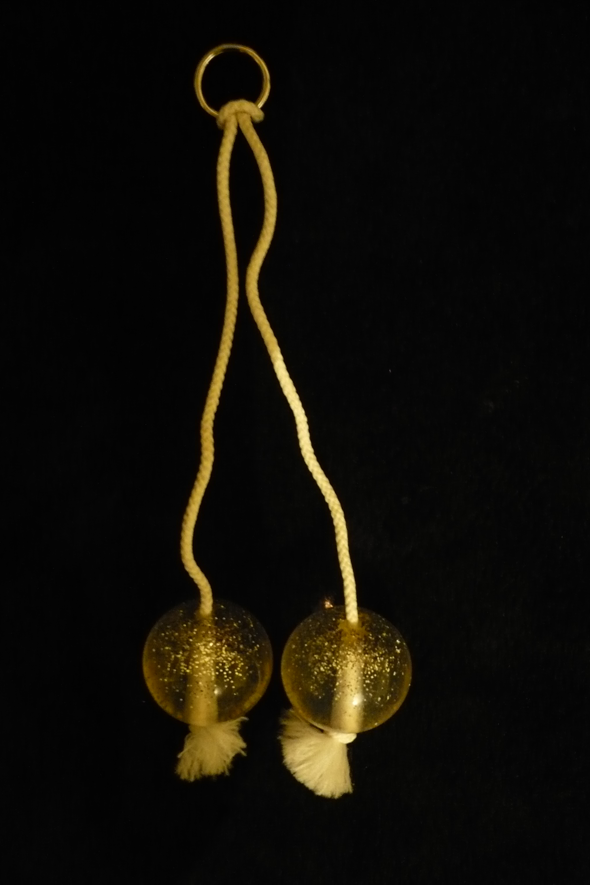 Juego de tiki-taka